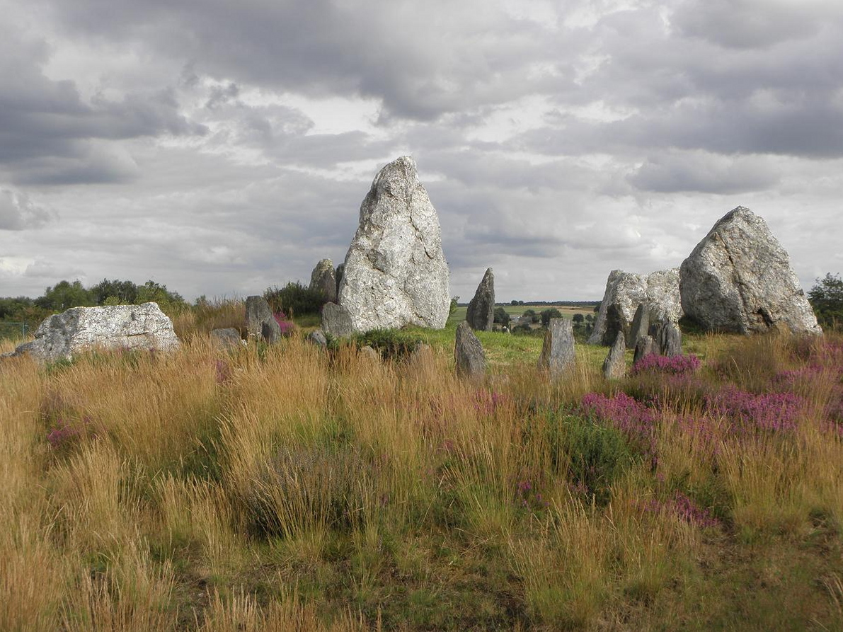 Tumulus du Château Bû à Saint-Just (35).